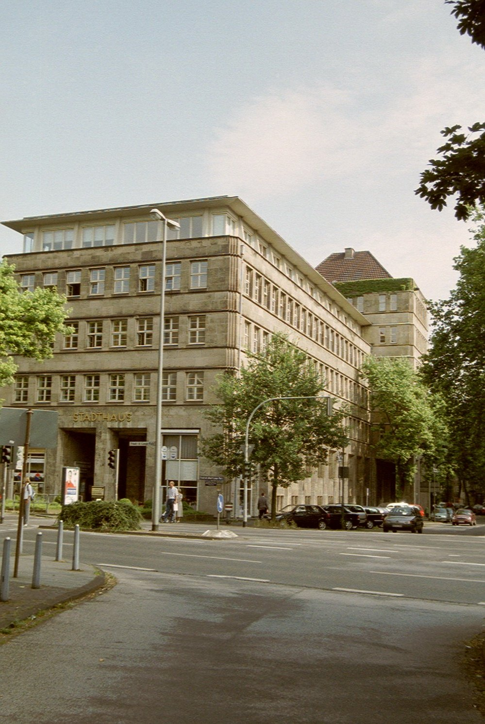 Stadthaus Duisburg, Friedrich-Albert-Lange-Platz 7, 47051 Duisburg